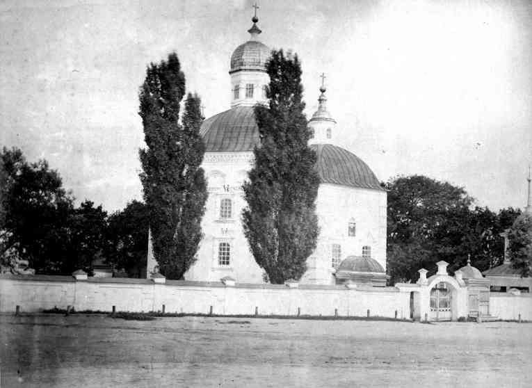 Казачий полковой собор в Стародубе